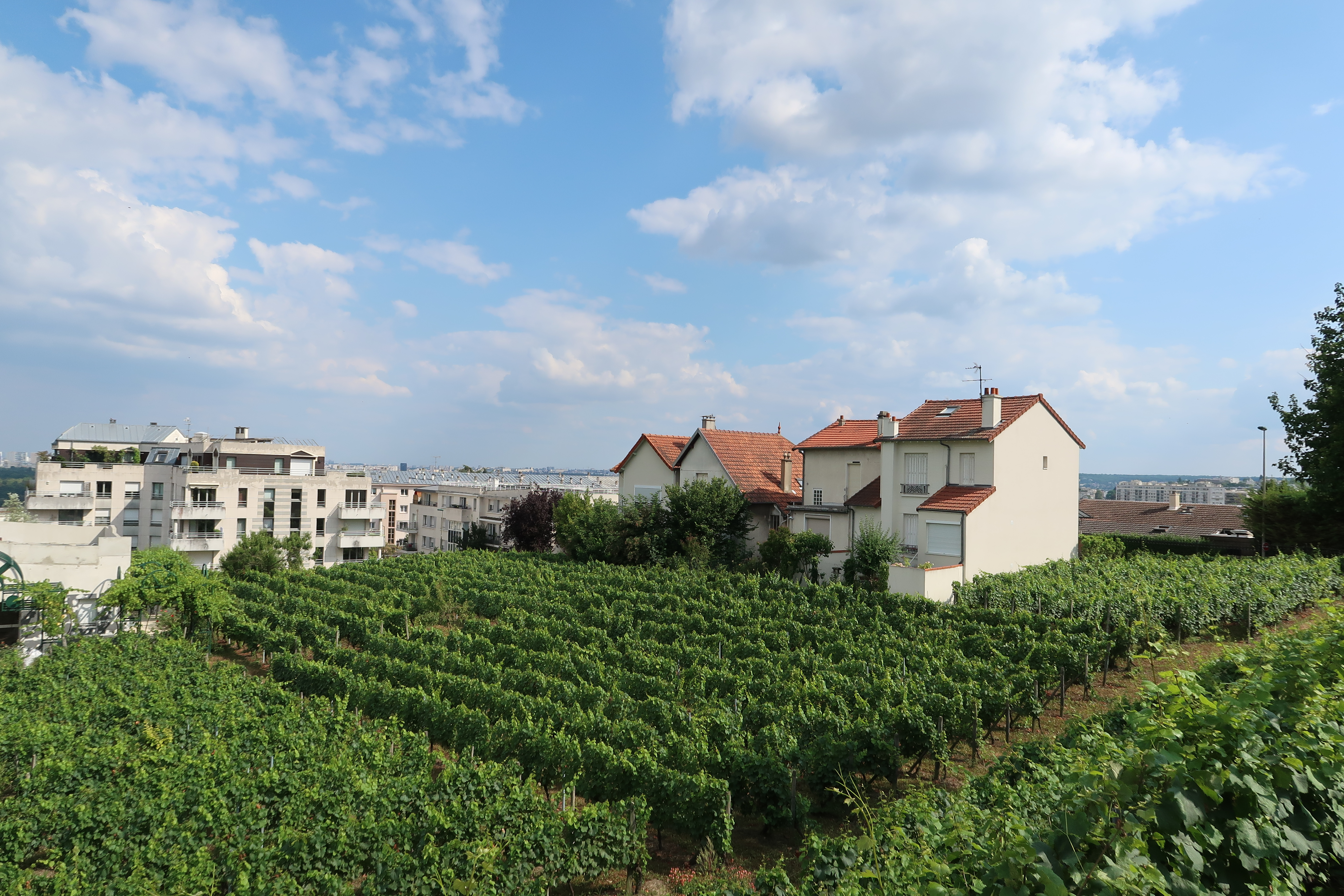 Vigne municipale de Suresnes, 4 rue du Passage Saint-Maurice (Hauts-de-Seine).